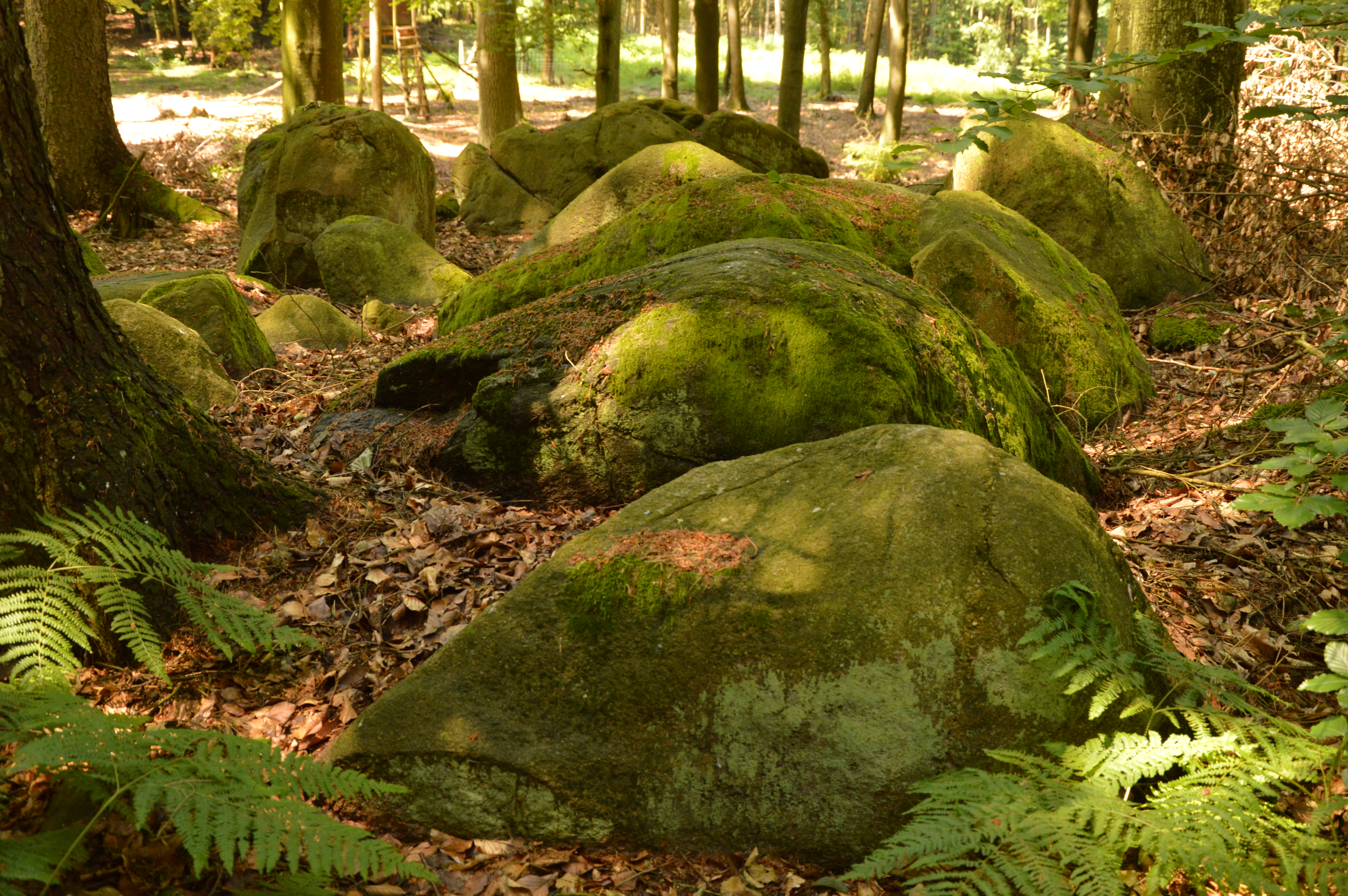 Grosssteingrab Tangeln 5 bei Mellin